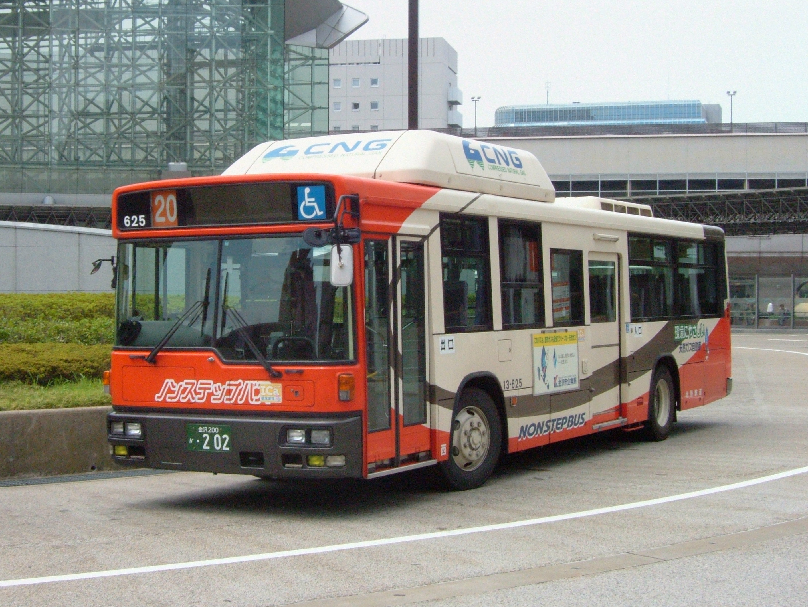 北陸鉄道のノンステップバス（13-625、日産ディーゼル・スペースランナーRA・西日本車体工業製）